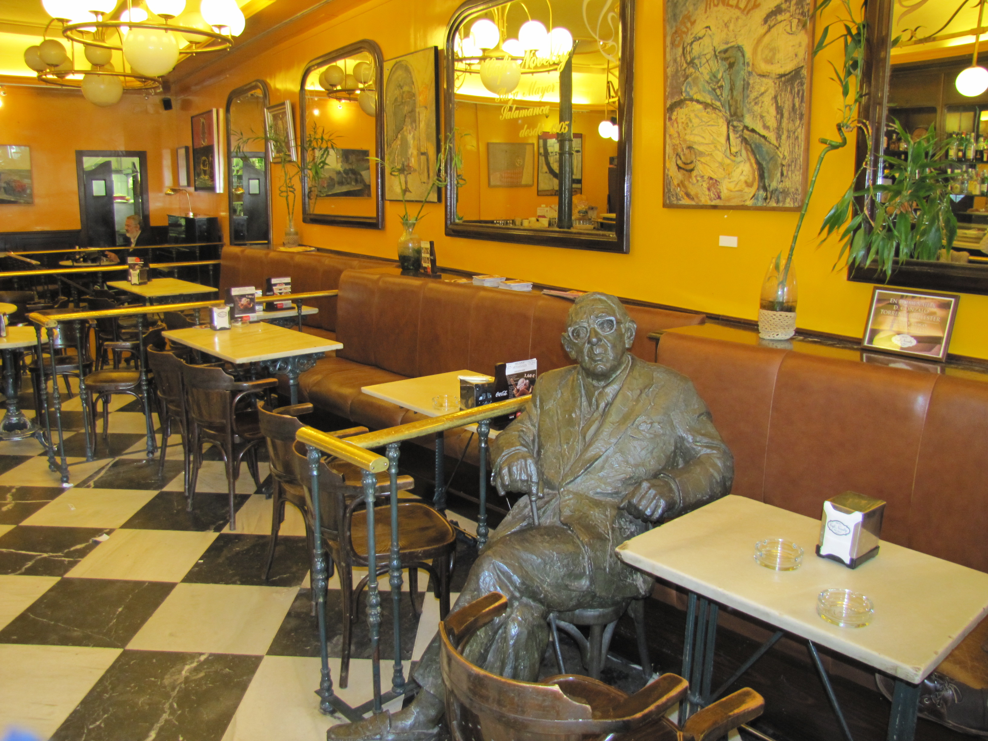 Estatua de D. Gonzalo Torrente Ballester, realizada por el escultor Fernando Mayoral en el año 2000, y situada en el café literario: Café Novelty. El más antiguo de los cafés de Salamanca, inaugurado en 1905 en la Plaza Mayor de Salamanca.